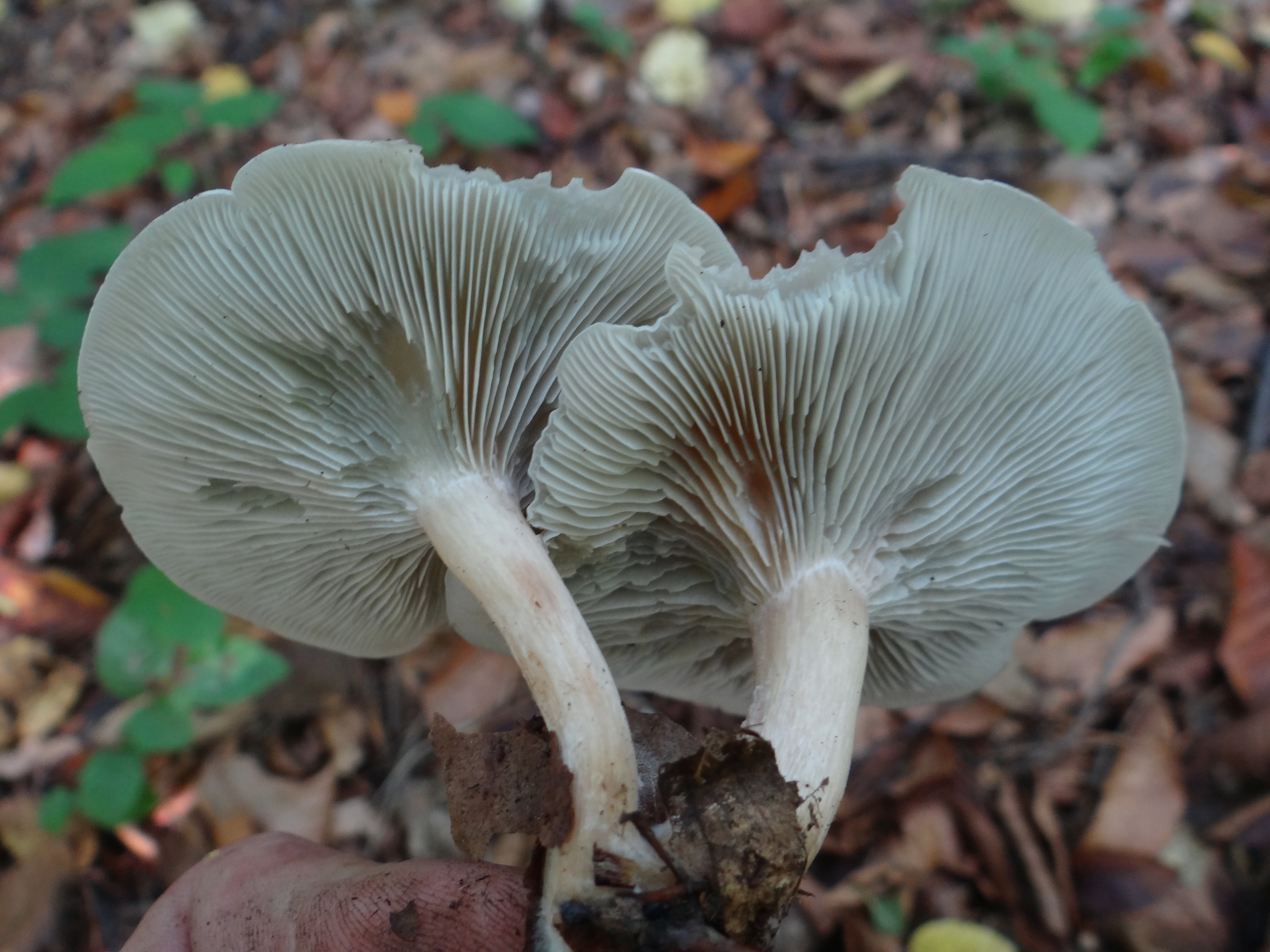 Clitocybe odora (location: Poland, Kamionna (województwo małopolskie)